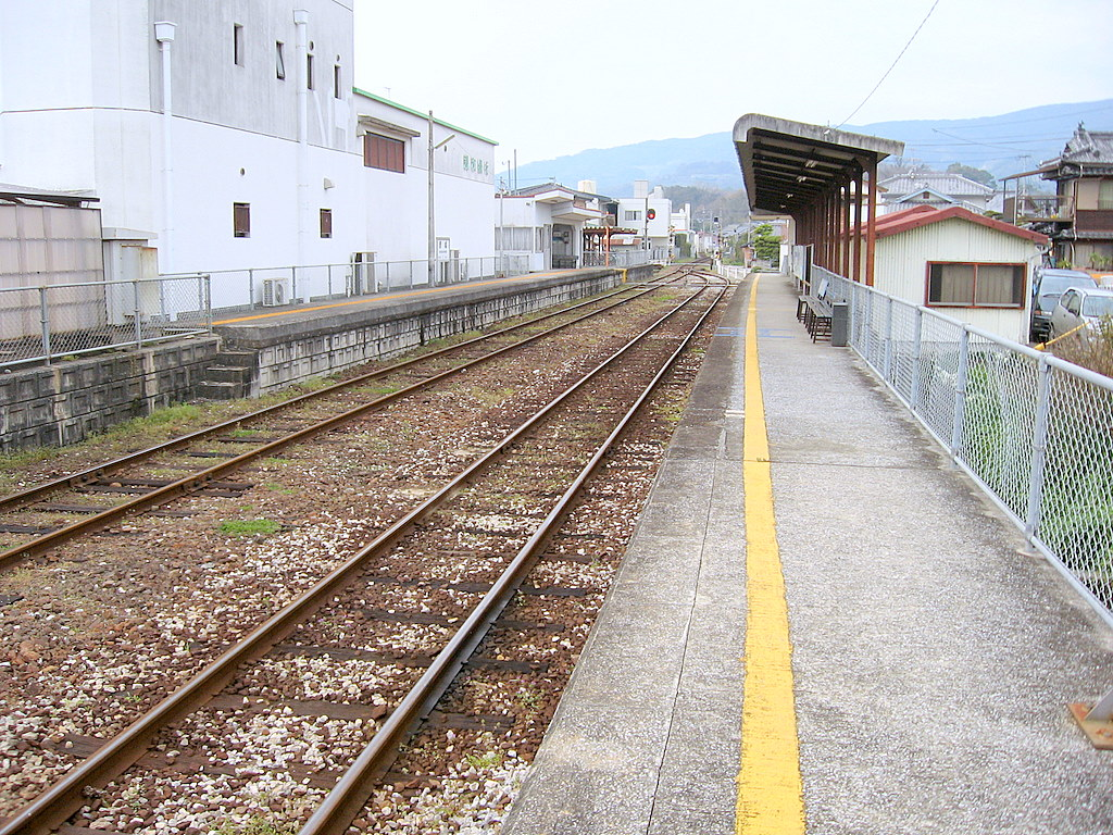 島原鉄道原城駅ホーム(2006.03.14に投稿者が撮影)